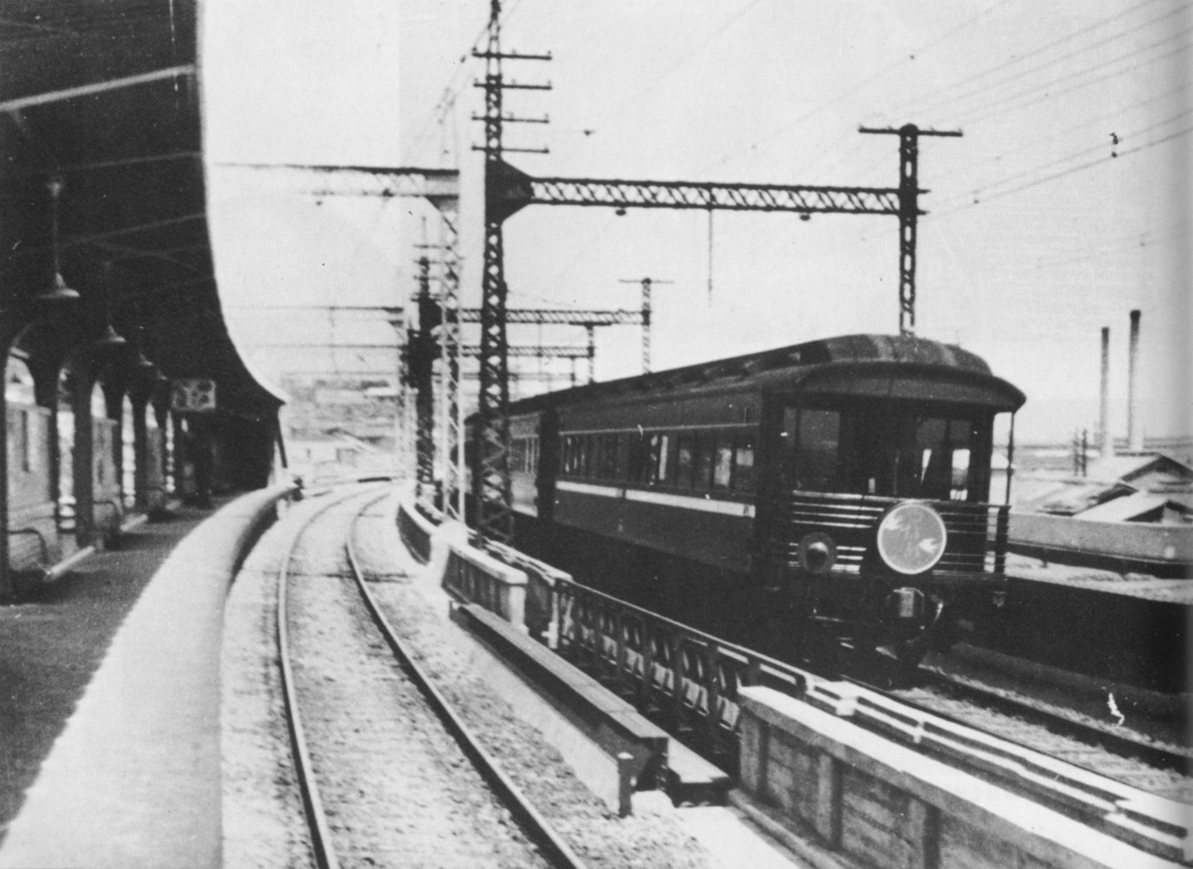 阪急春日野道駅から上り特急つばめ展望車を見る。